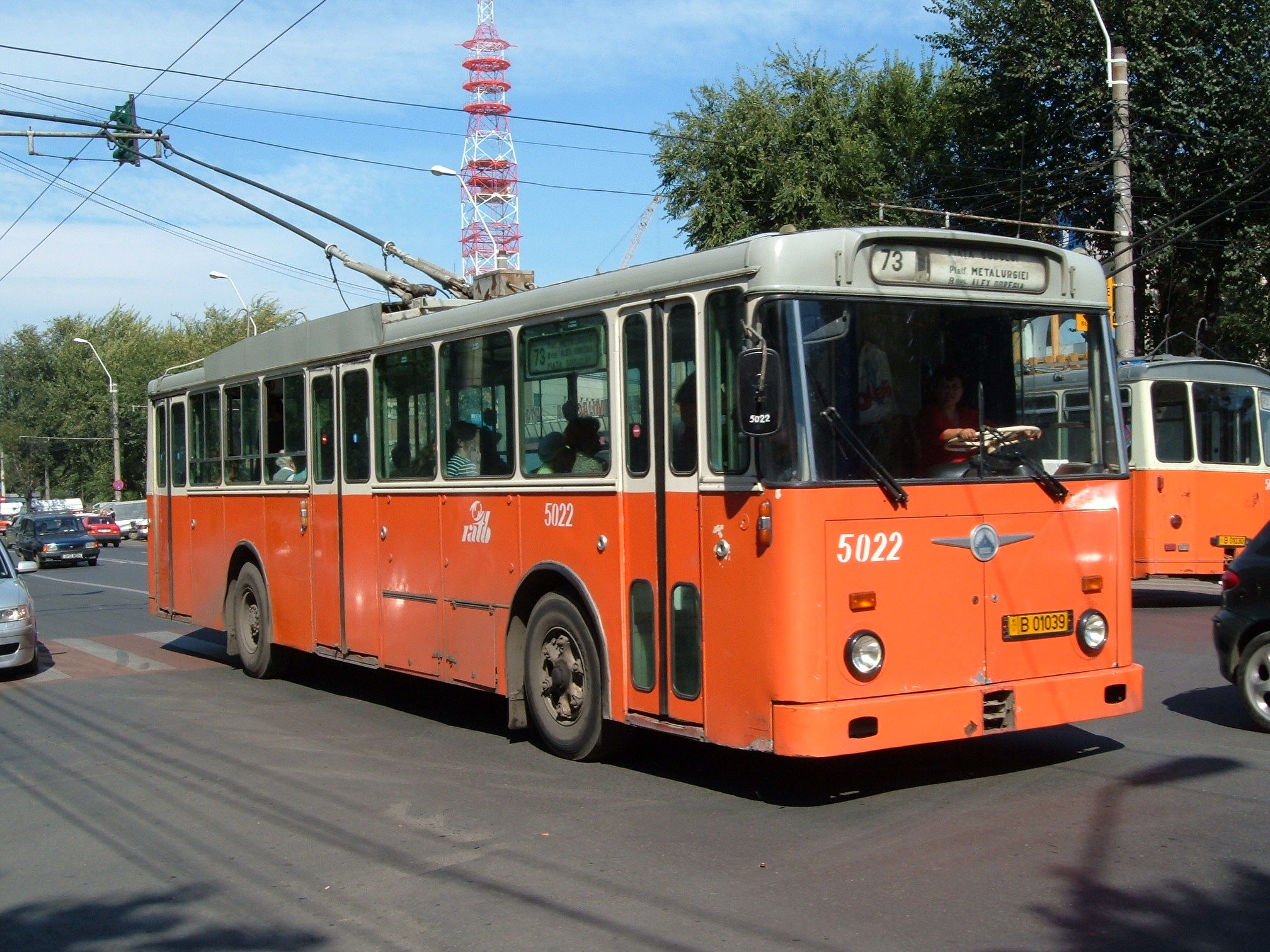 Troleibuz Saurer nr. de parc 5022.